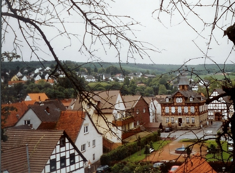 Ortsmitte von Helmarshausen mit dem alten Rathaus